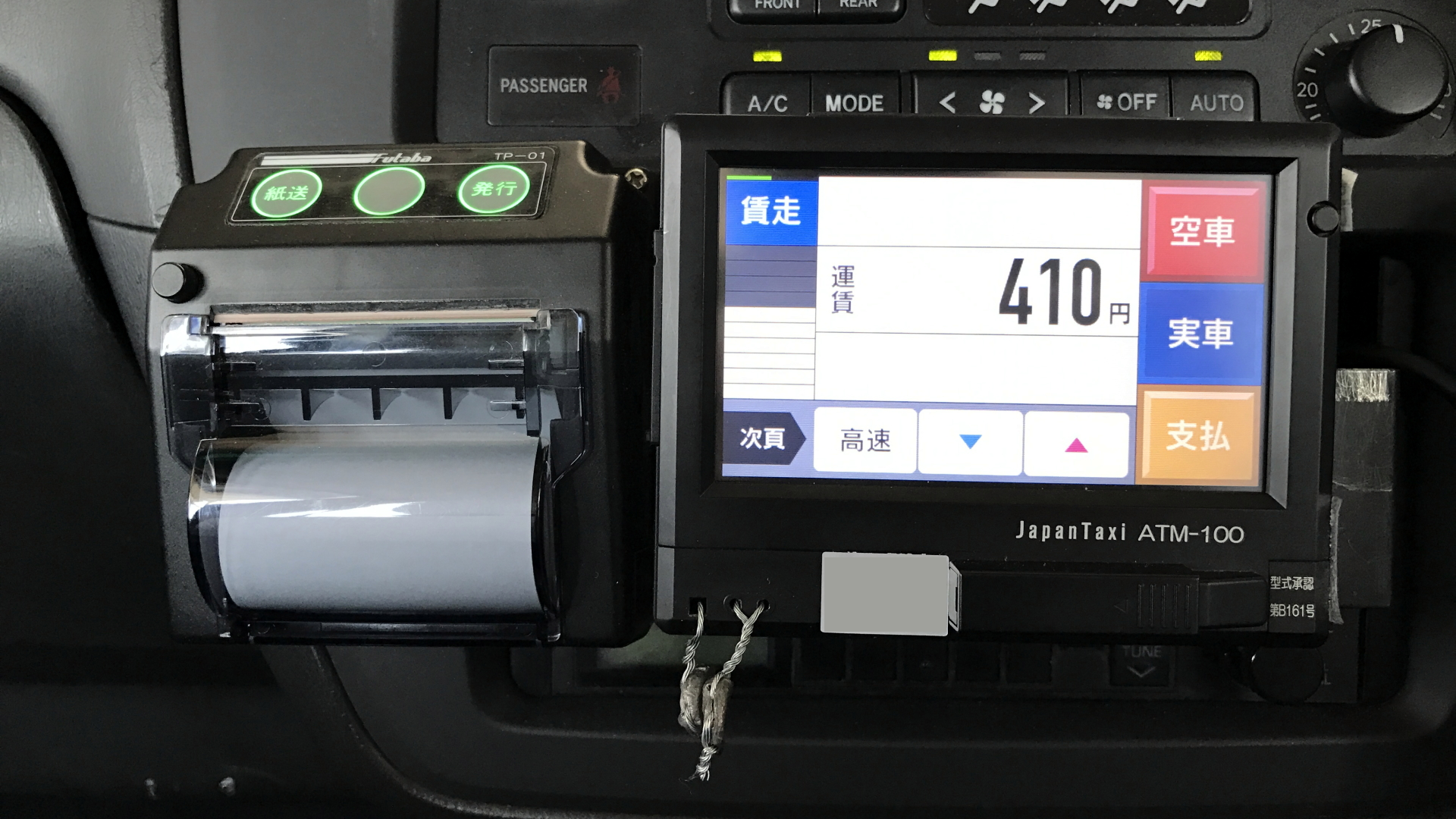 JapanTaxi（日本交通グループ）製タクシーメーター（ATM-100型）。二葉計器製R9-6型タクシーメーターの独自ソフトウェア版。